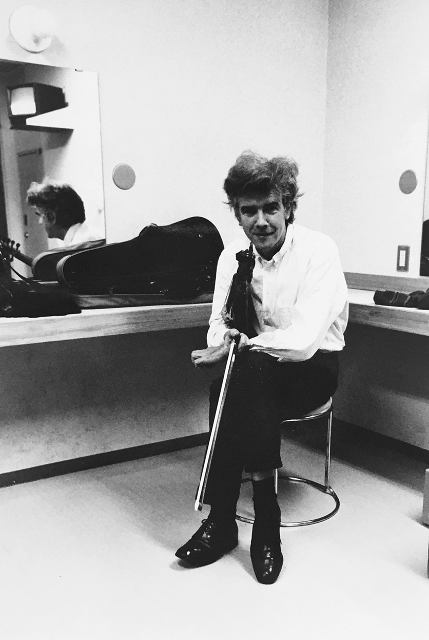 1987年日本でVIOLECTRAを演奏する直前、楽屋でのJohannes Fritsch